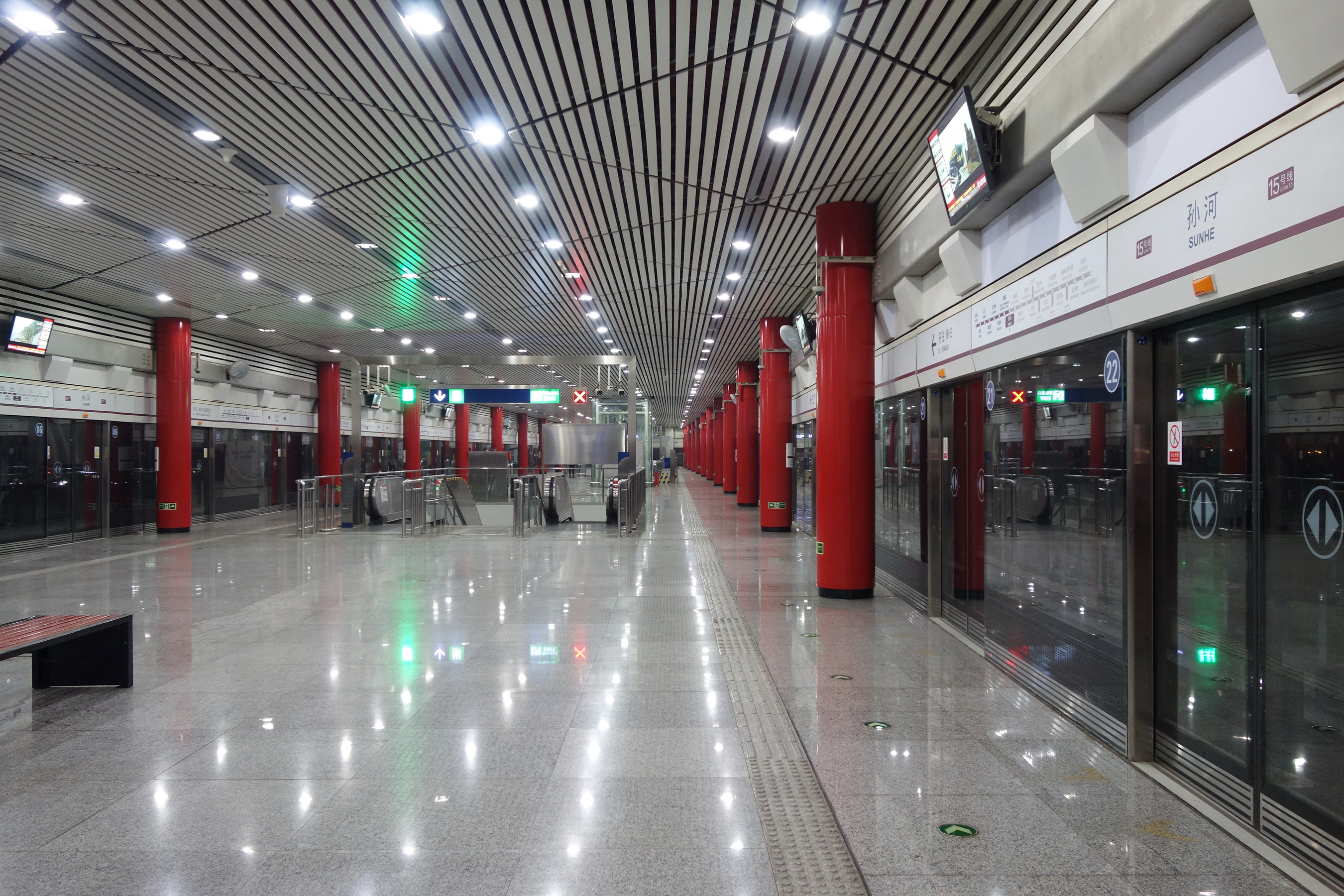 北京地铁15号线孙河站站台